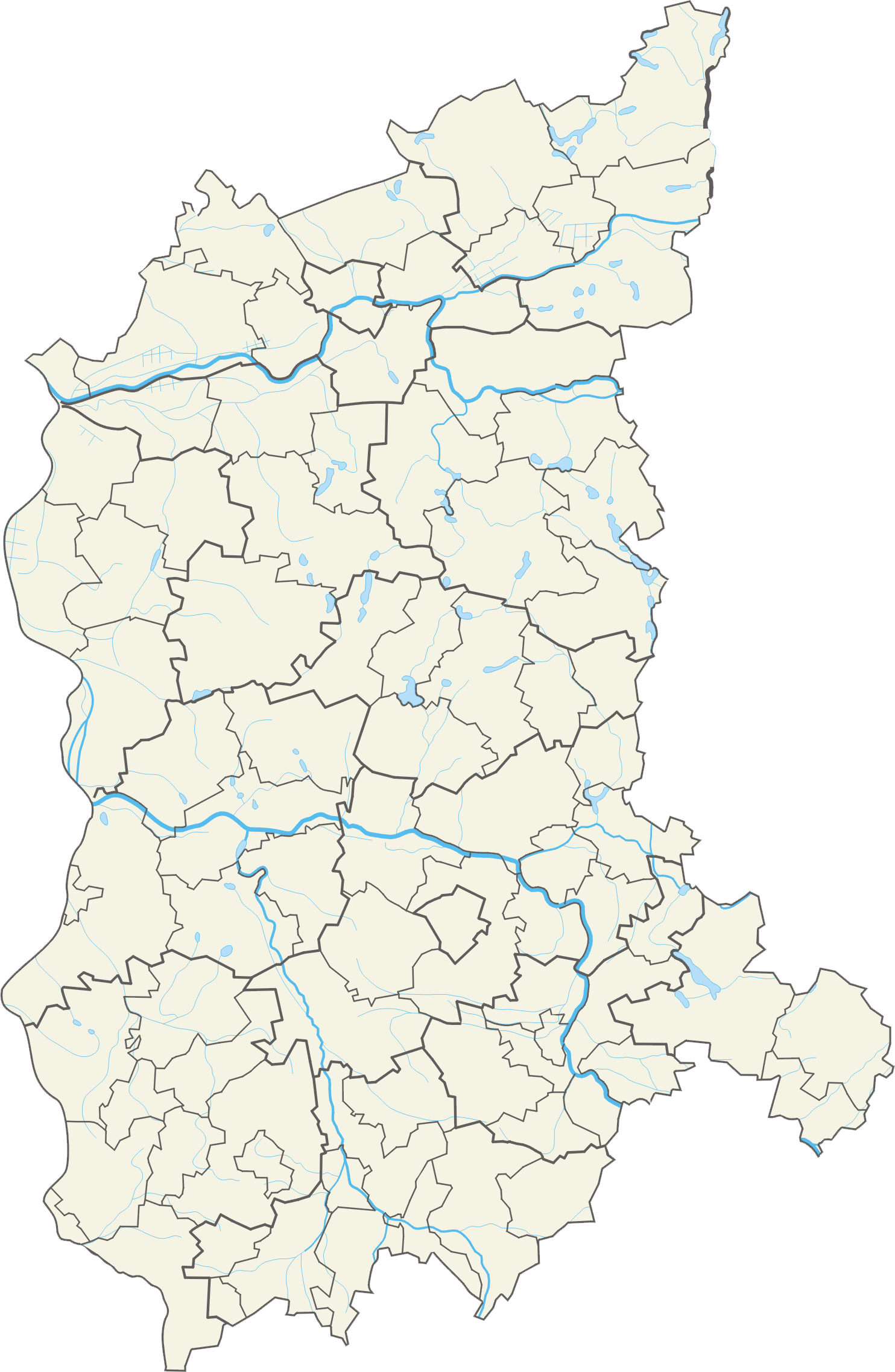 Województwo lubuskie – powiaty i gminy Współrzędne graniczne mapy: N: 53.1239° N S: 51.3635° N W: 14.5357° E E: 16.4169° E